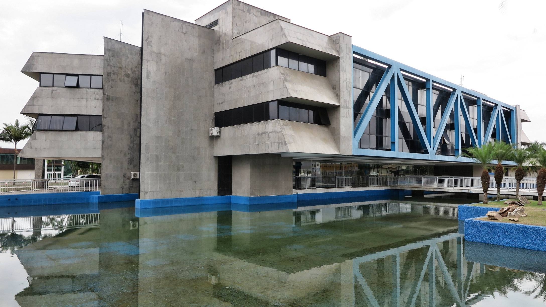 Conjunto urbanístico de Brasília construído em decorrência do Plano Piloto traçado para a cidade